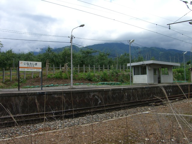 伊那田島駅 いなたしまえき